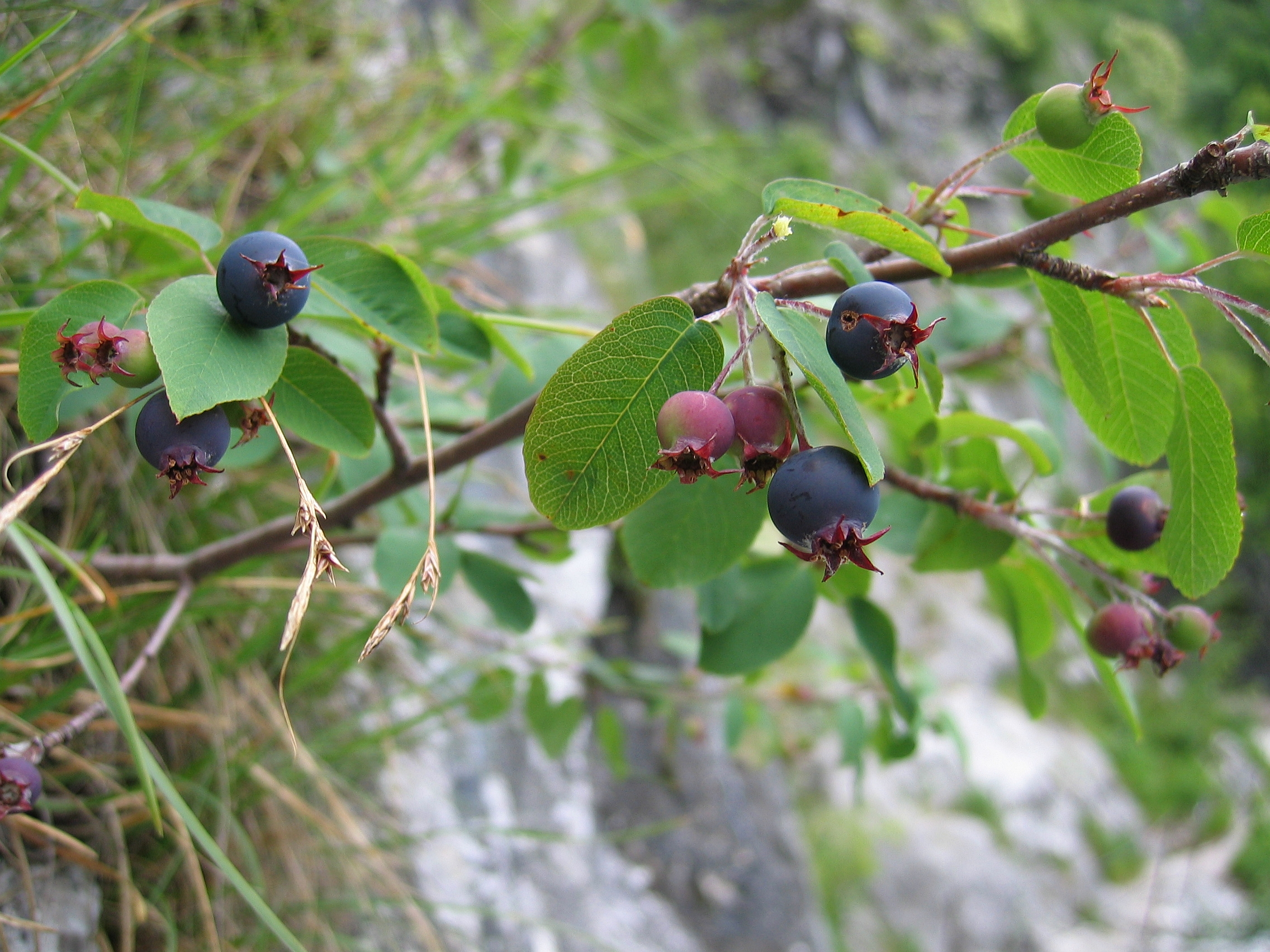 Fruits of Amelanchier ovalis Miesweg / Traunsee, Upper Austria, Austria